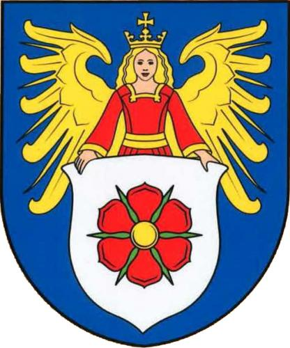 Znak města Hodonín